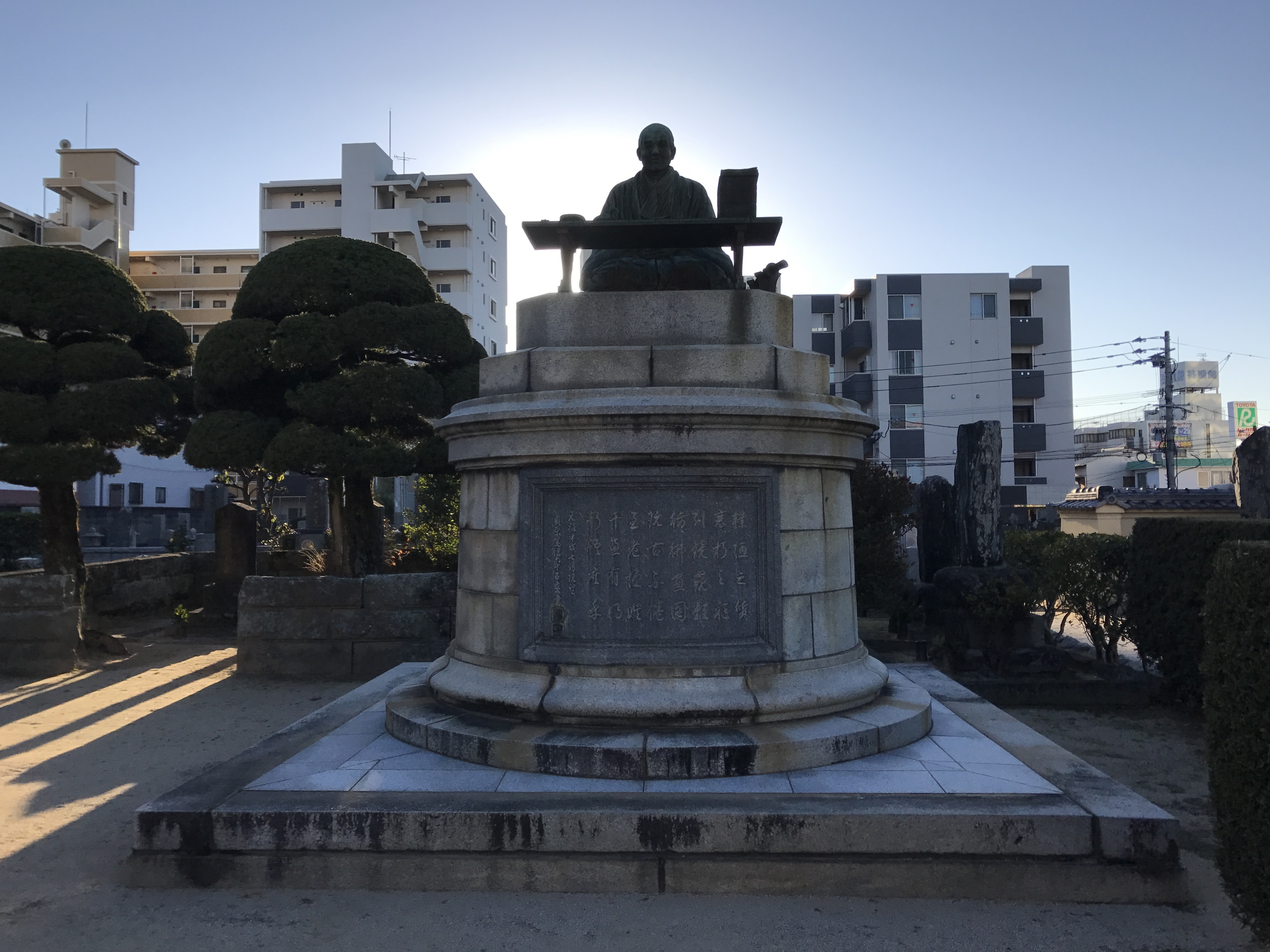 福岡市中央区・金龍寺境内の貝原益軒像